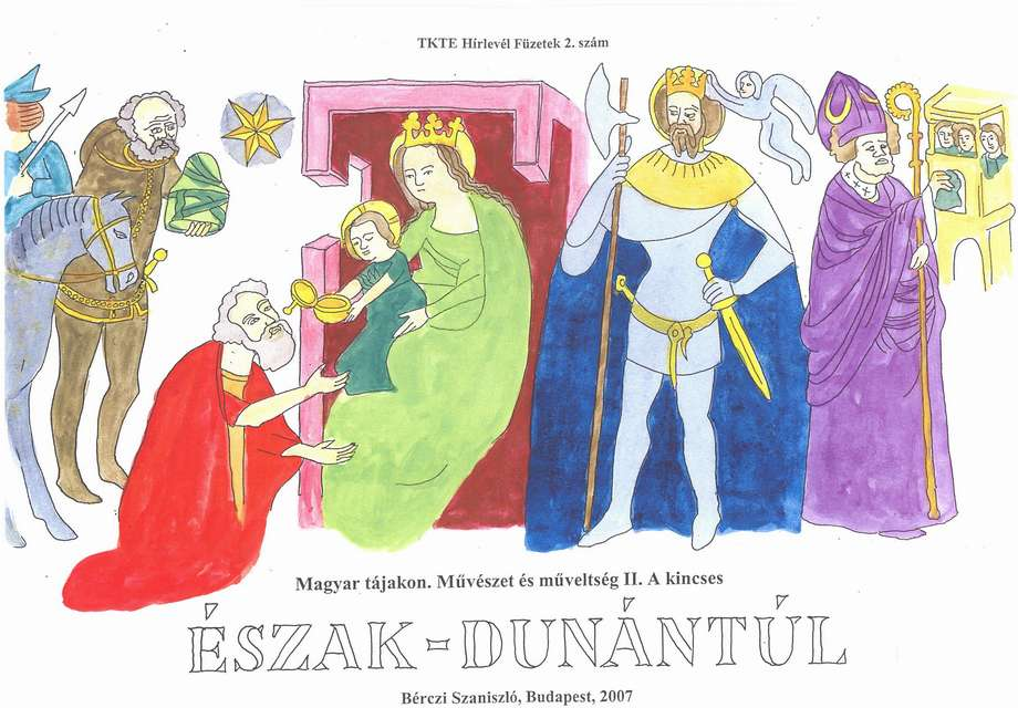 Részlet a veleméri freskósorból